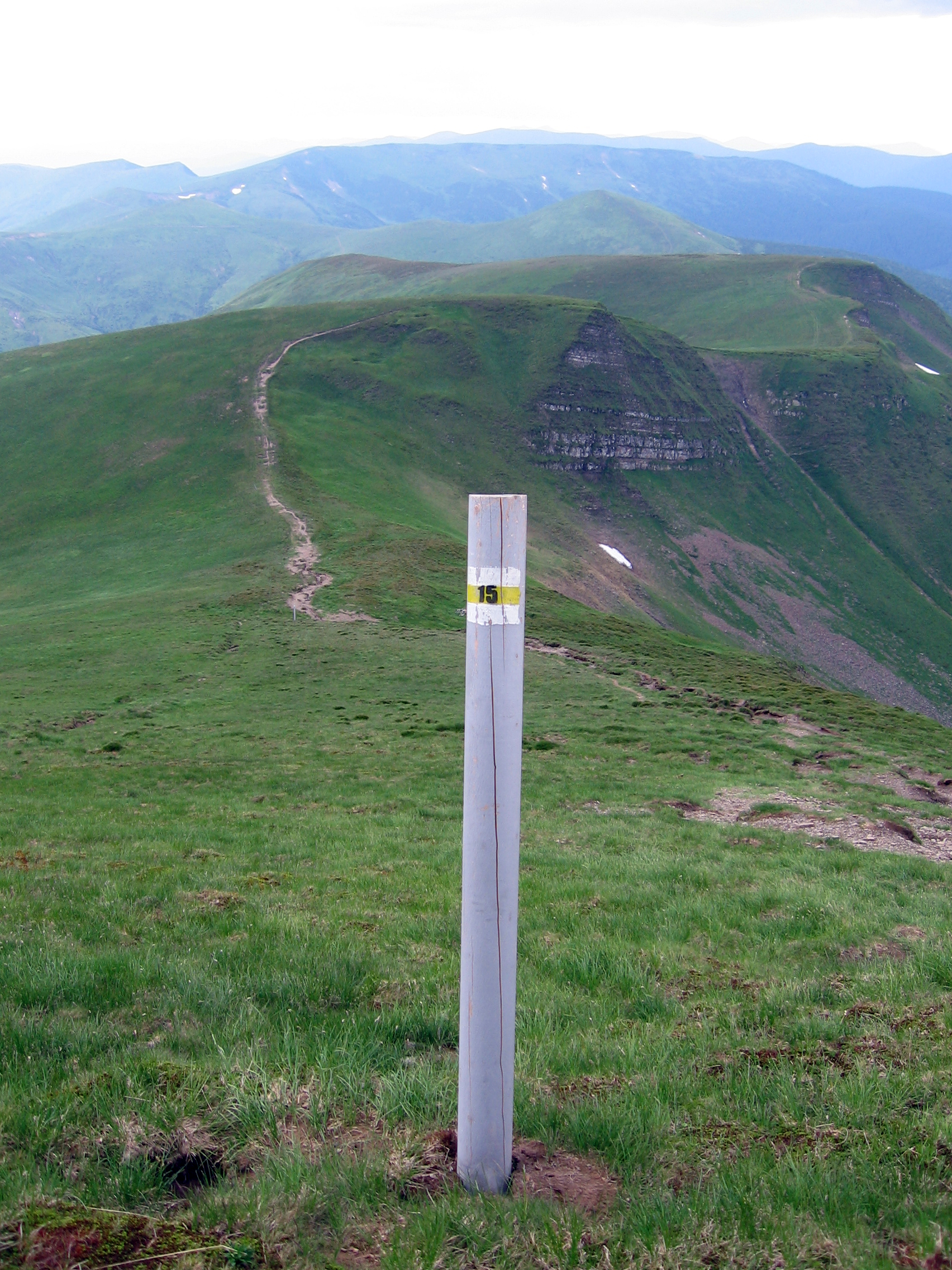 Стовп з маркуванням ЗТШ 2006 р.